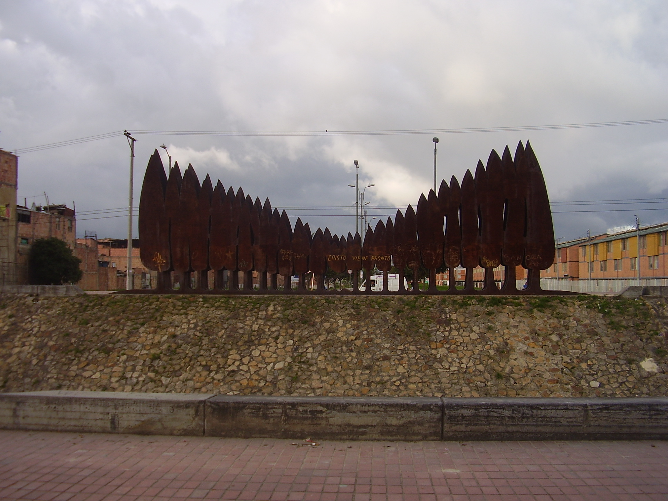 Monumento en la ciudadela el recreo, ejemplo en la solucion de vivienda para clases populares... CRISTO VIENE PRONTO